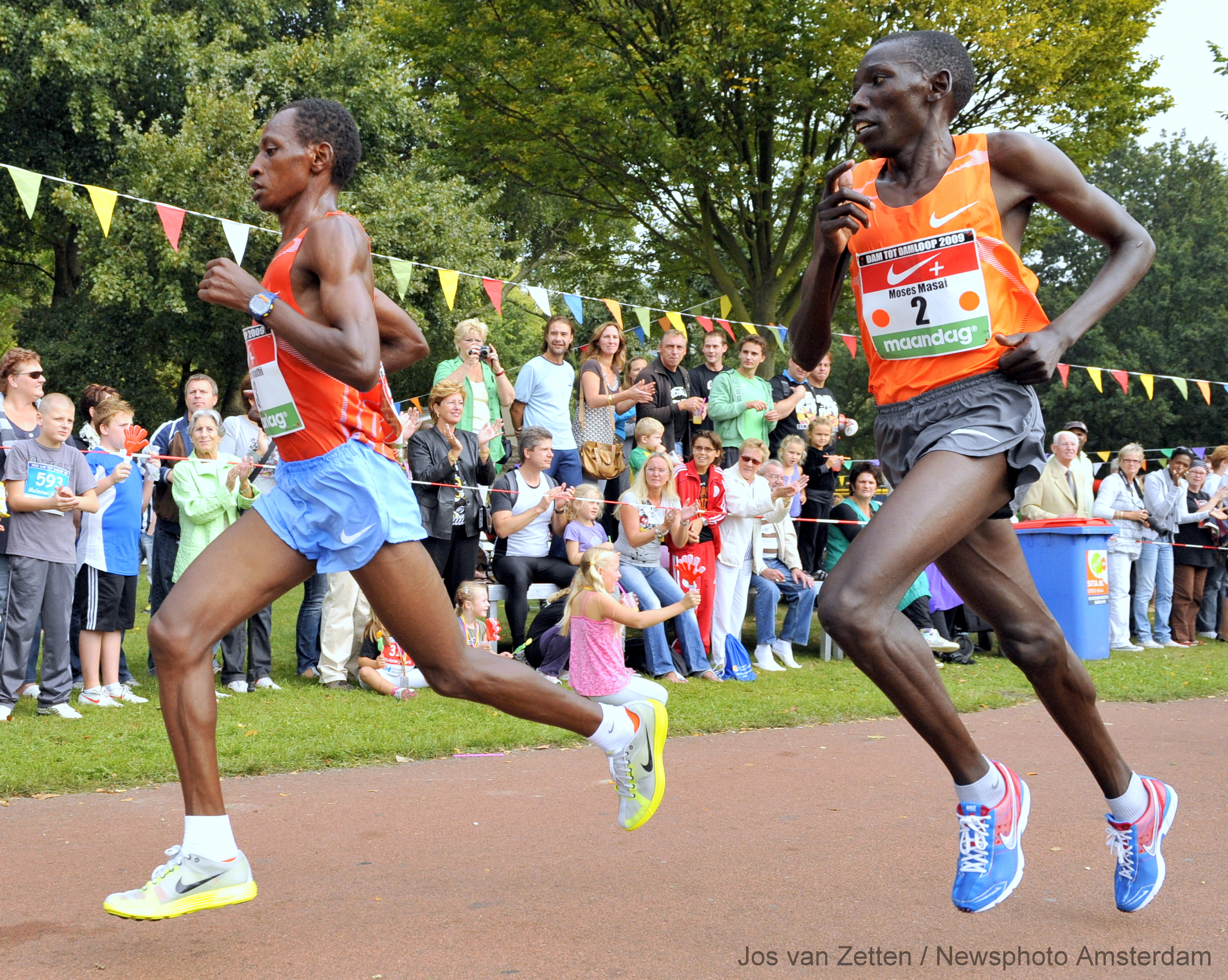 Moses en Linet Masai, broer en zus afkomstig uit Kenia, wonnen de jubileumeditie van de Dam tot Damloop Zie ook